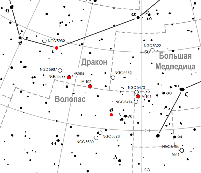 Окрестность звёзд θ Волопаса и ι Дракона, где находился объект, обозначенный Мешеном как M102. На данной версии карты неправильно указано положение звезды HR 5635. Используйте файл M102scheme-2.jpg